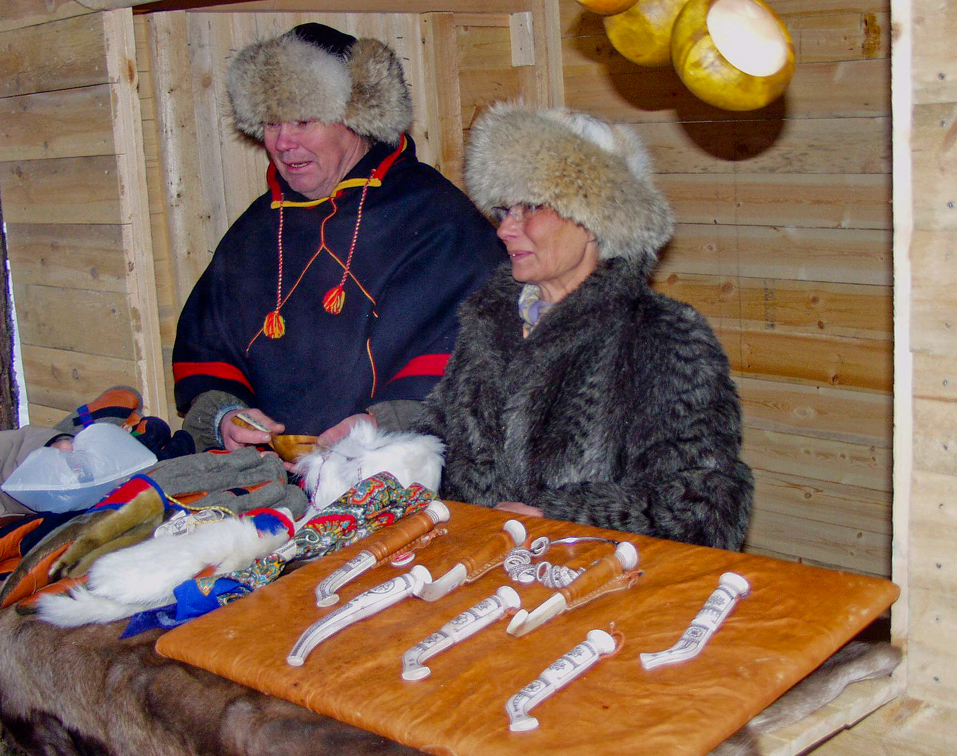 Stand auf dem historischen Markt zum Verkauf von sámischen Messern und anderem Kunsthandwerk